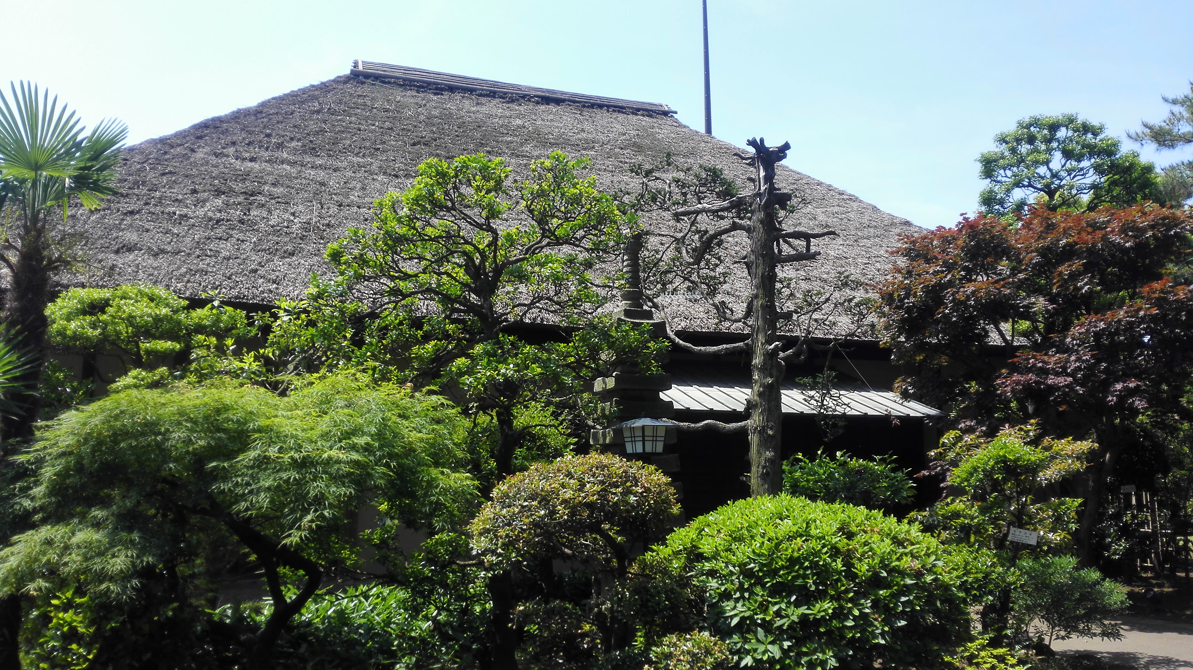 世田谷代官屋敷の主屋。